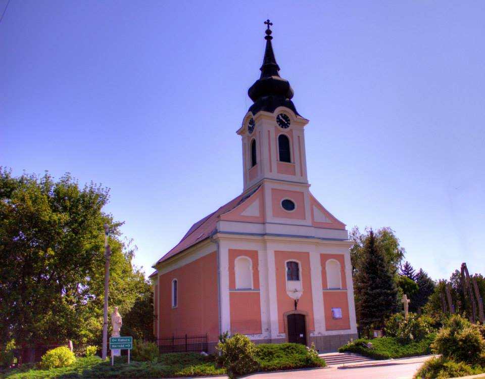 Barocke Kirche gebaut im Jahre 1776